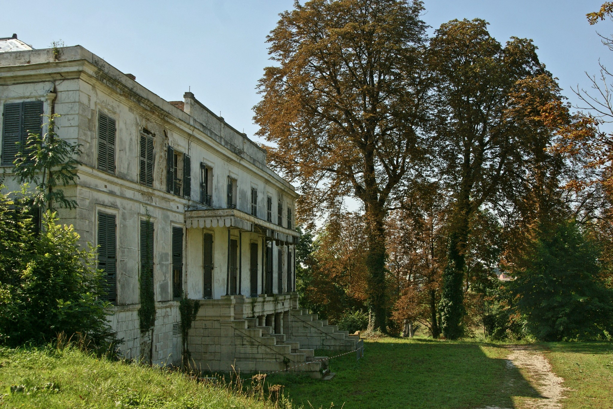 Château de Montjean dans le Domaine du château de Montjean, à Wissous.